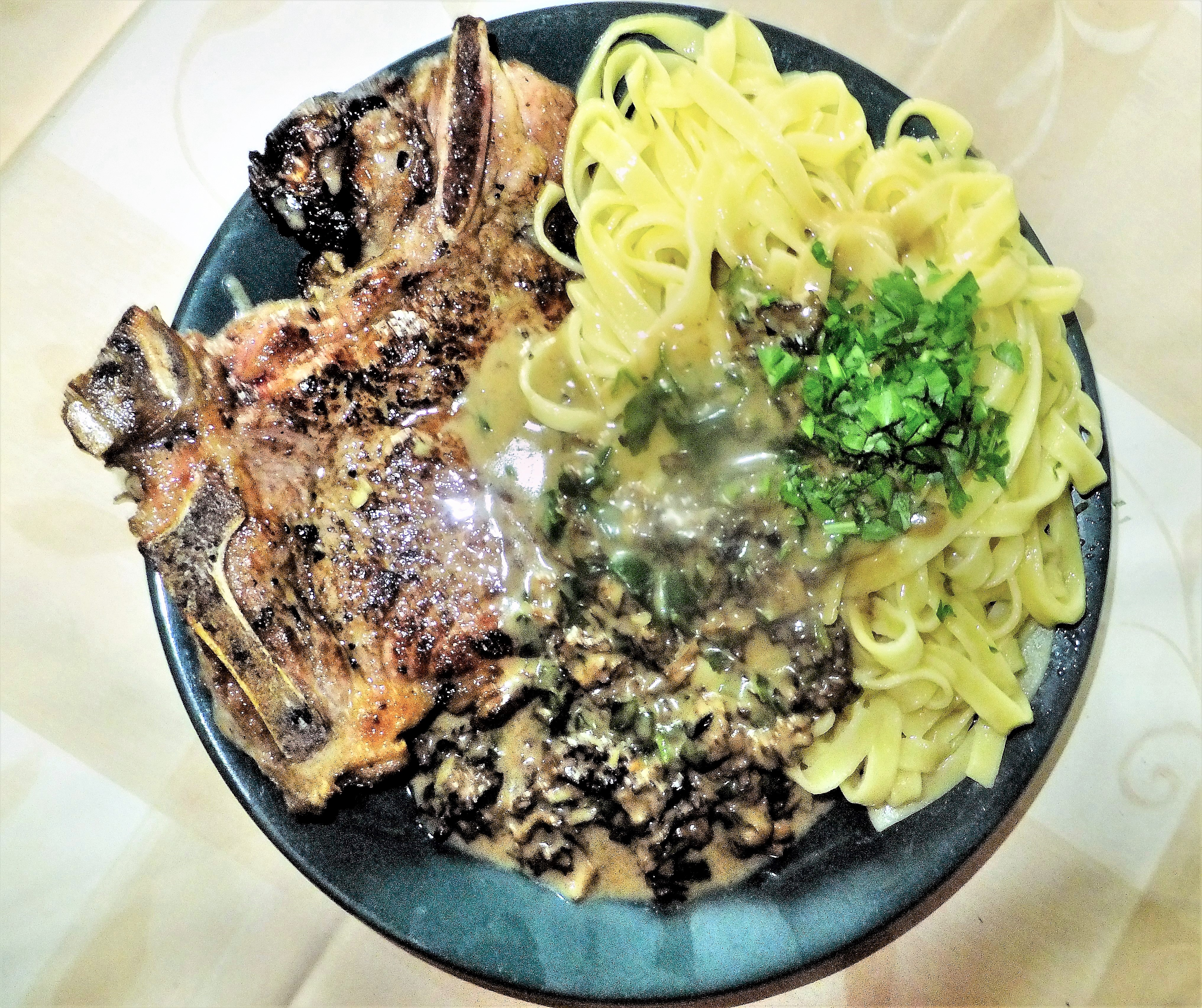 Kalbskotelette, Morchelrahmsauce, Tagliatelle